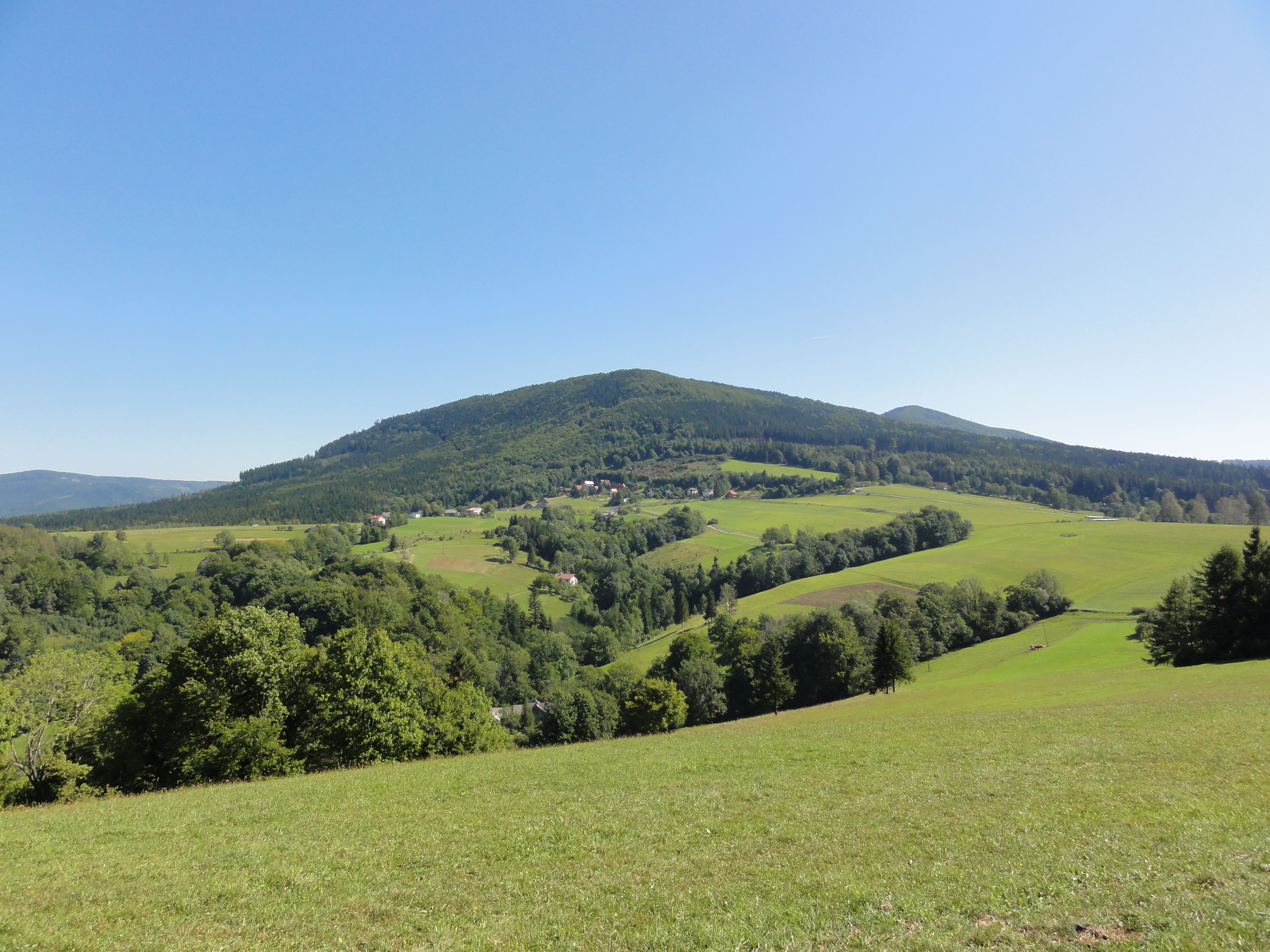 Beskid Śląski Mała Czantoria spod Tuła